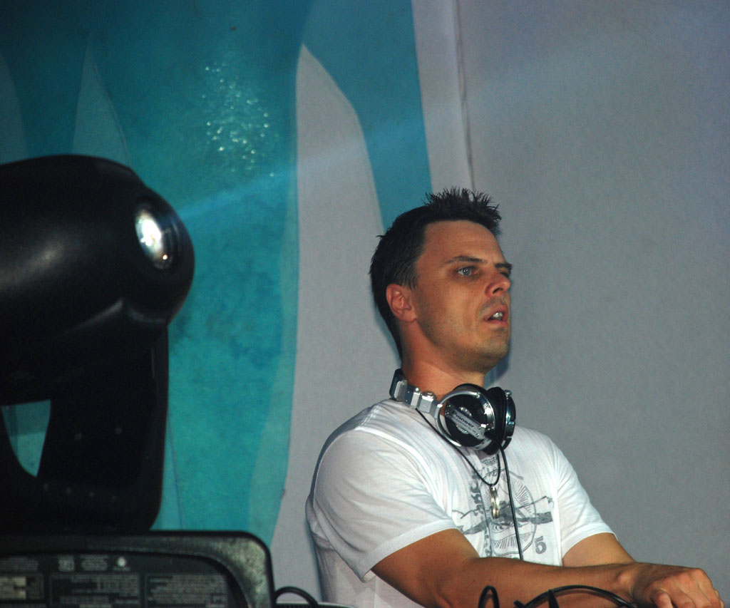 Markus Schulz at Mysteryland 2007